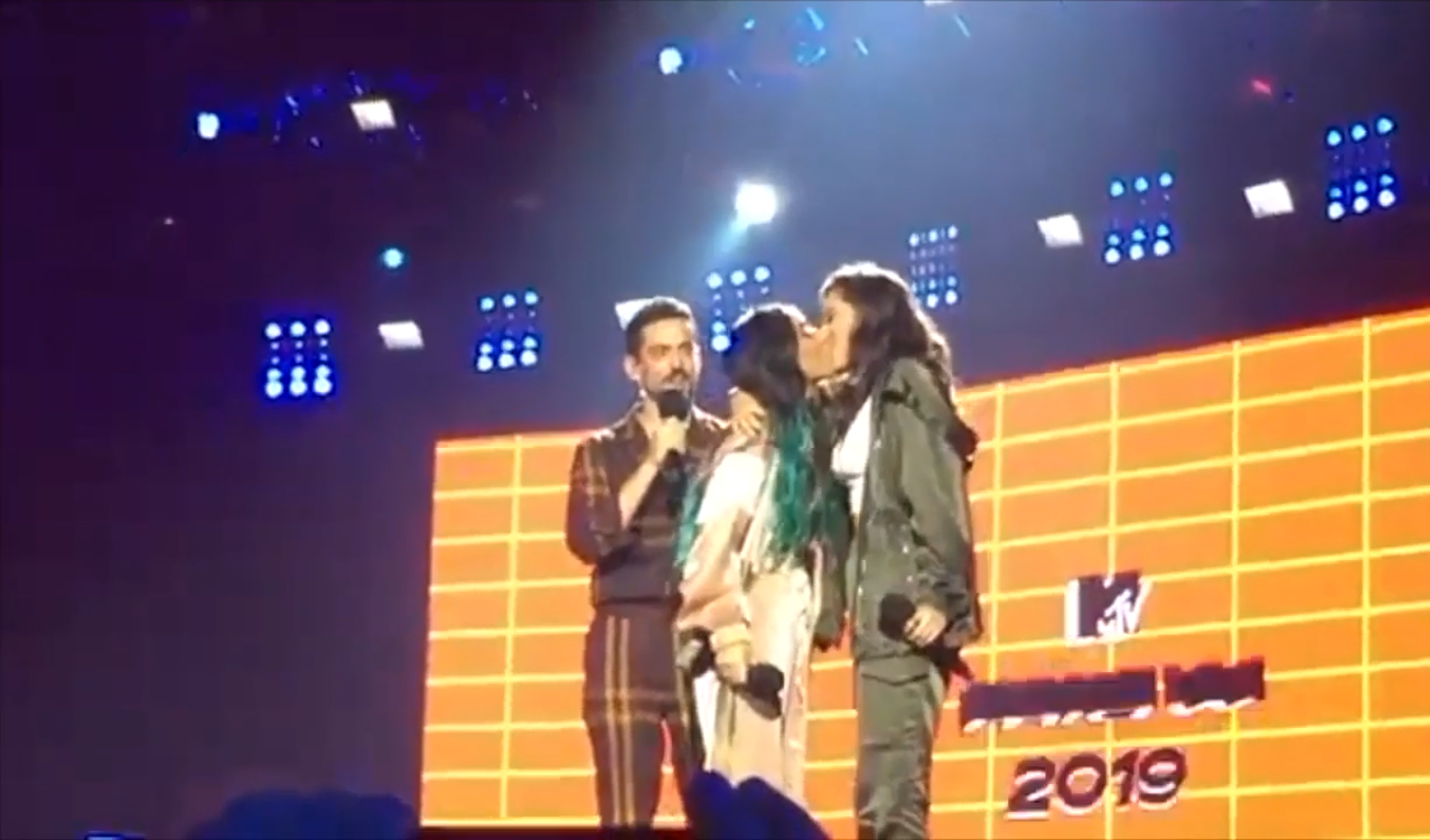 Luis Gerardo Méndez junto a Calle y Poché besandose en los MTV MIAW 2019